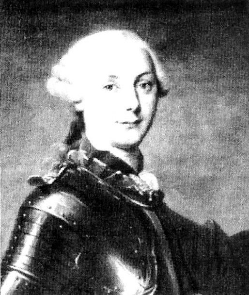 Charles de Bussy de Castelnau (1718 ou 1720-1785)